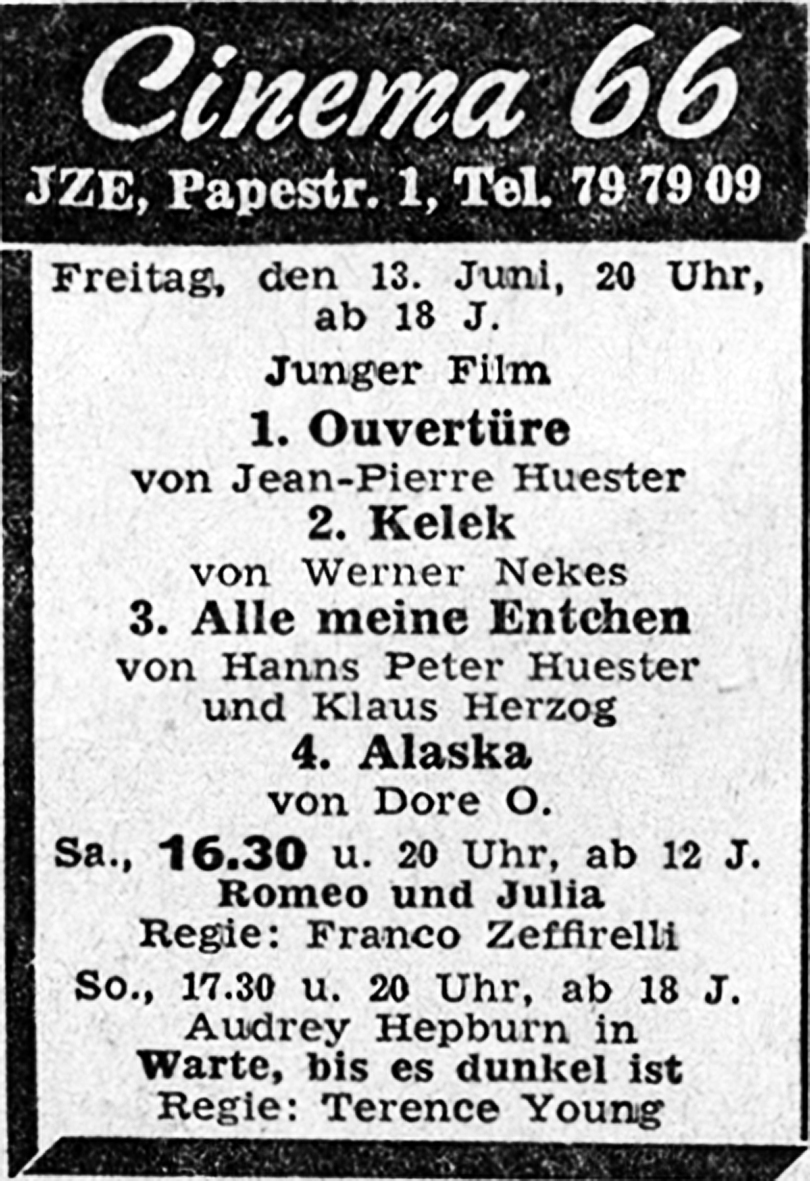 Cinema 66 JZE 1962 Zeitungsinserat vom 13.06.1969